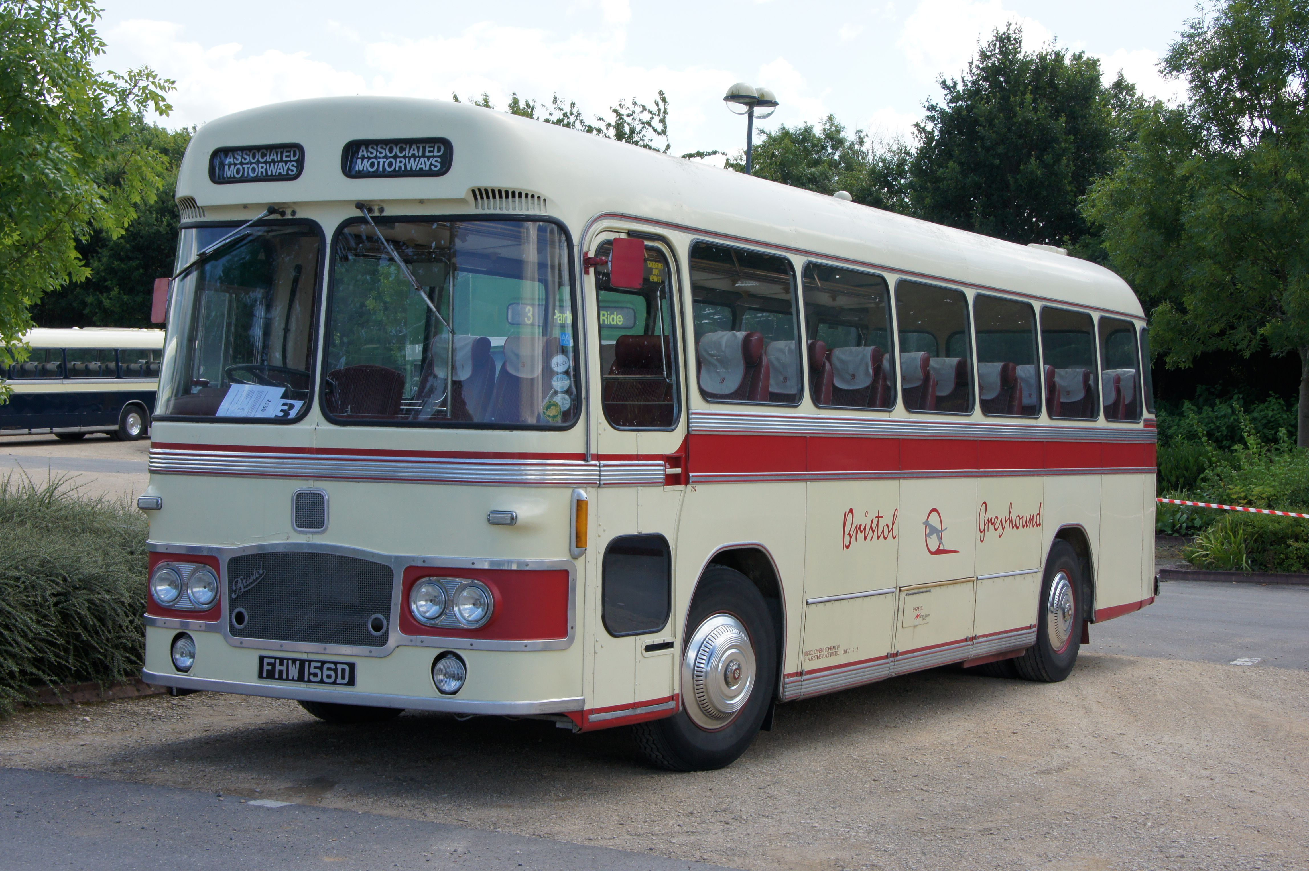 2150-FHW156D-1 140811 CPS